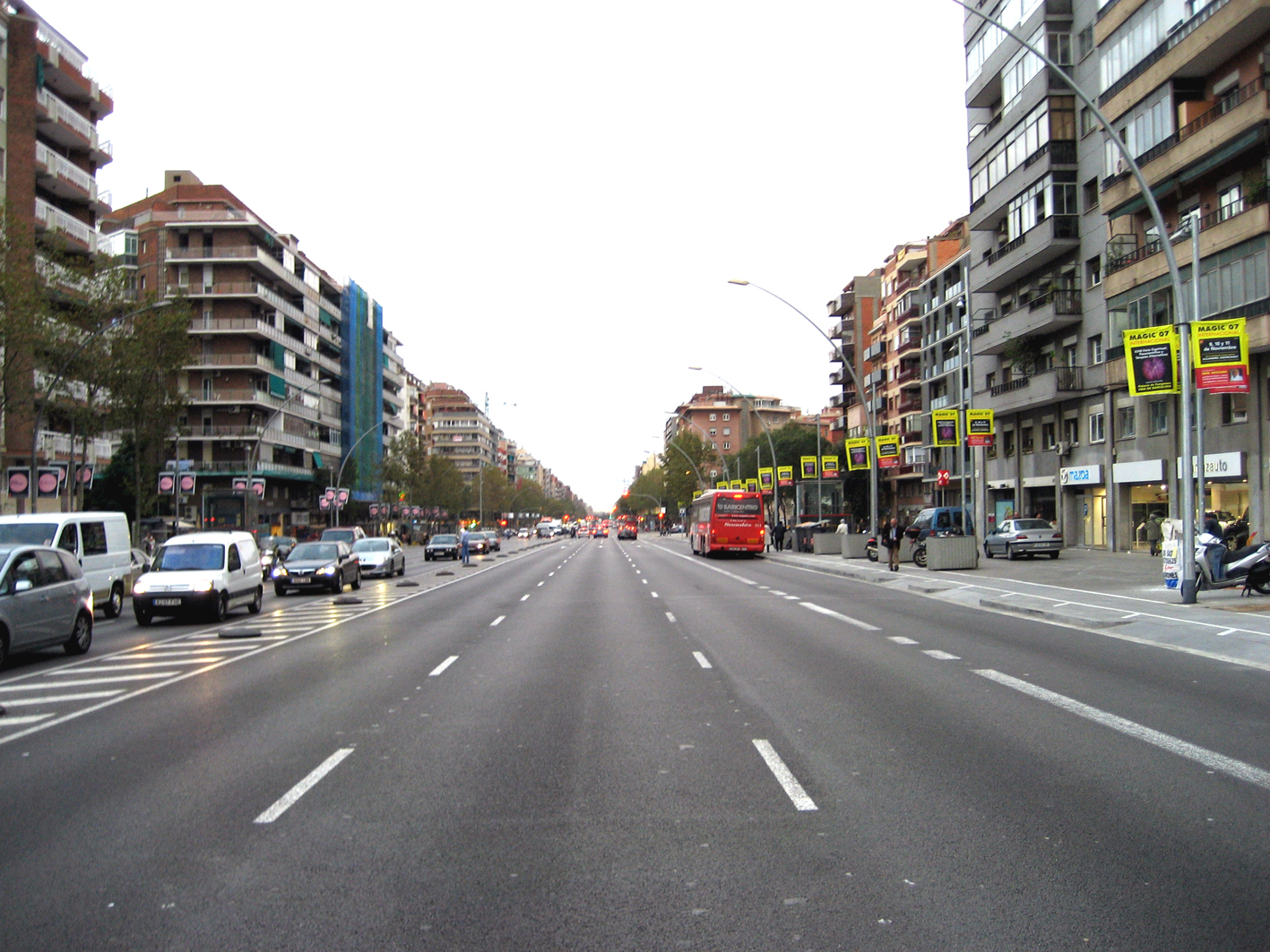 Avenida Meridiana en Barcelona. Cataluña. España